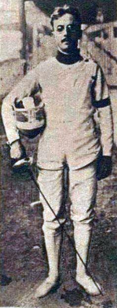 Charles Delporte, champion olympique individuel à l'épée en 1924.